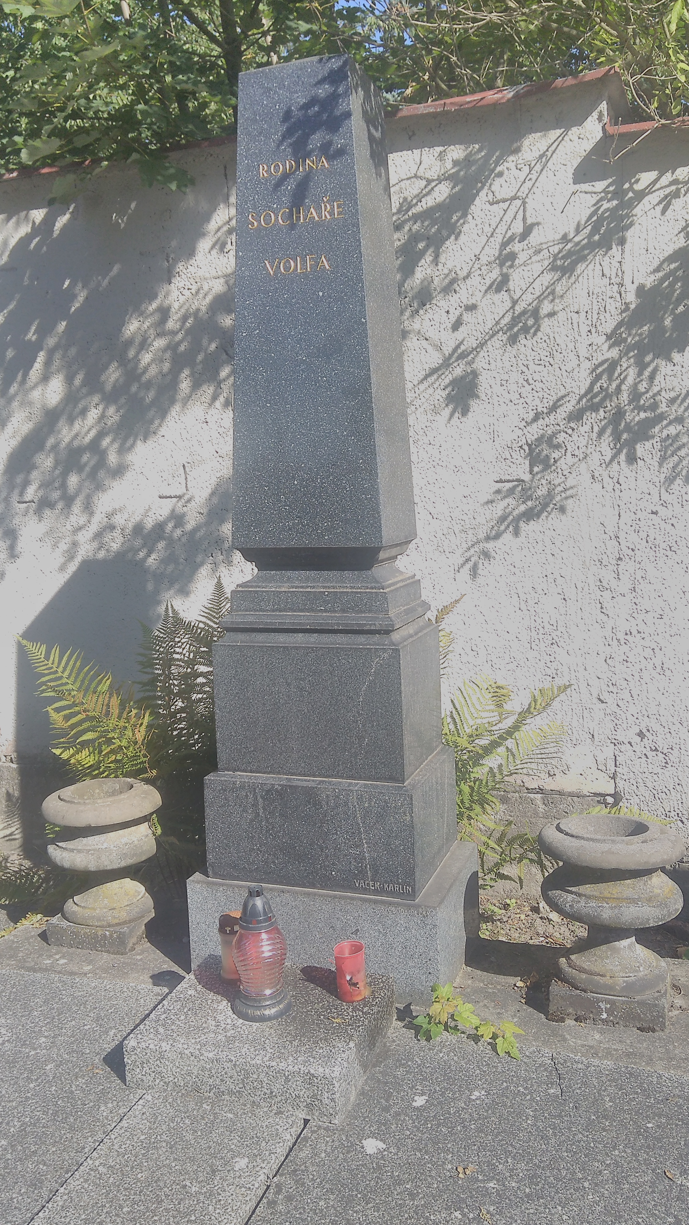 náhrobek: Rodina sochaře Volfa